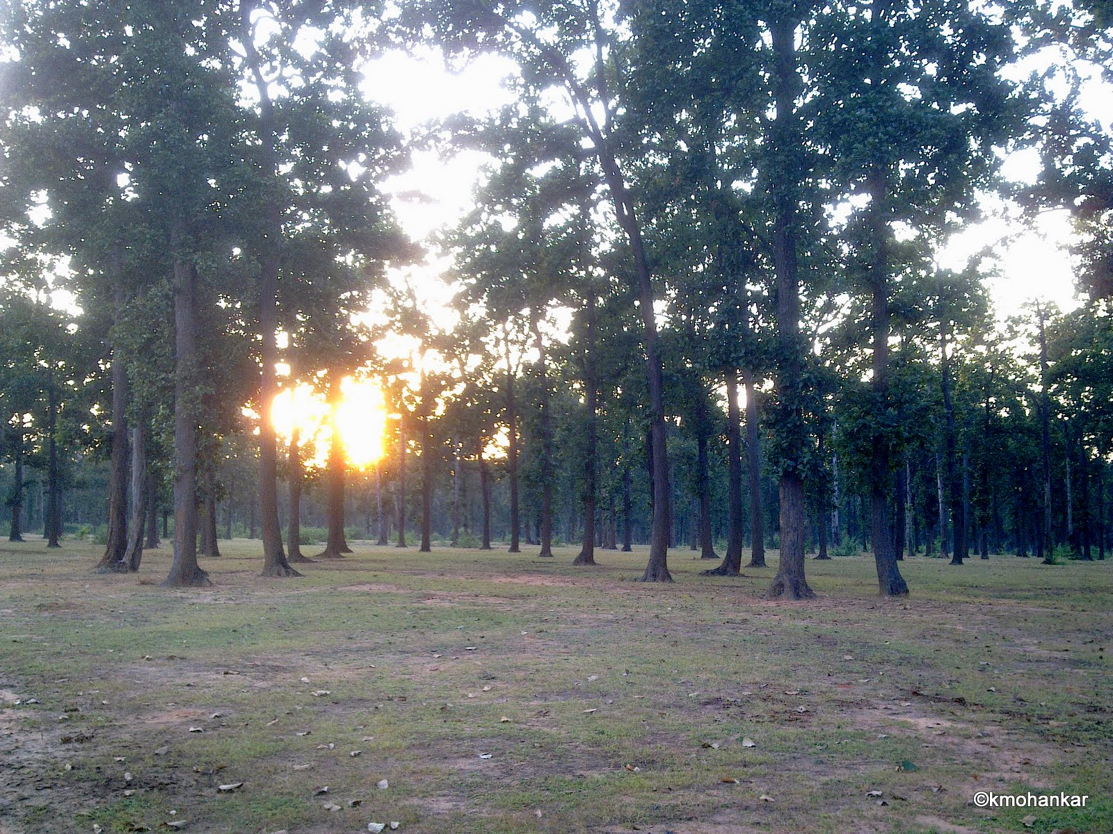 Sunset seen on Kotma Road, Anuppur, India